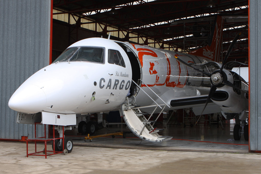 D2-EZZ Emb120 Air26